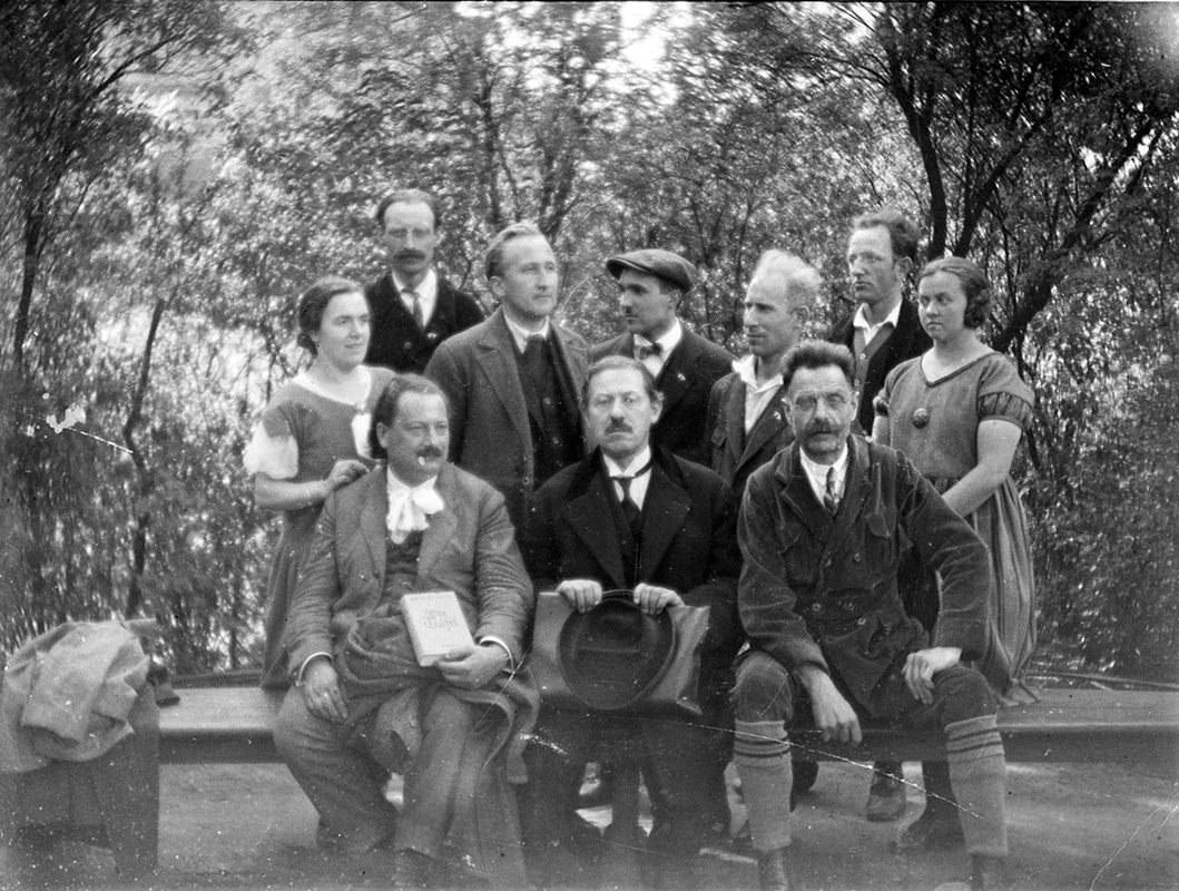 Die Abbildung zeigt Pierre Ramus (vorne links) im Kreise von Bremer Anarchistinnen und Anarchisten (FKAD) bzw. Anarchosyndikalistinnen und Anarchosyndikalisten (FAUD/AS) im Jahr 1930. Vorne in der Bildmitte sitzt mit der Aktentasche Berthold Cahn.